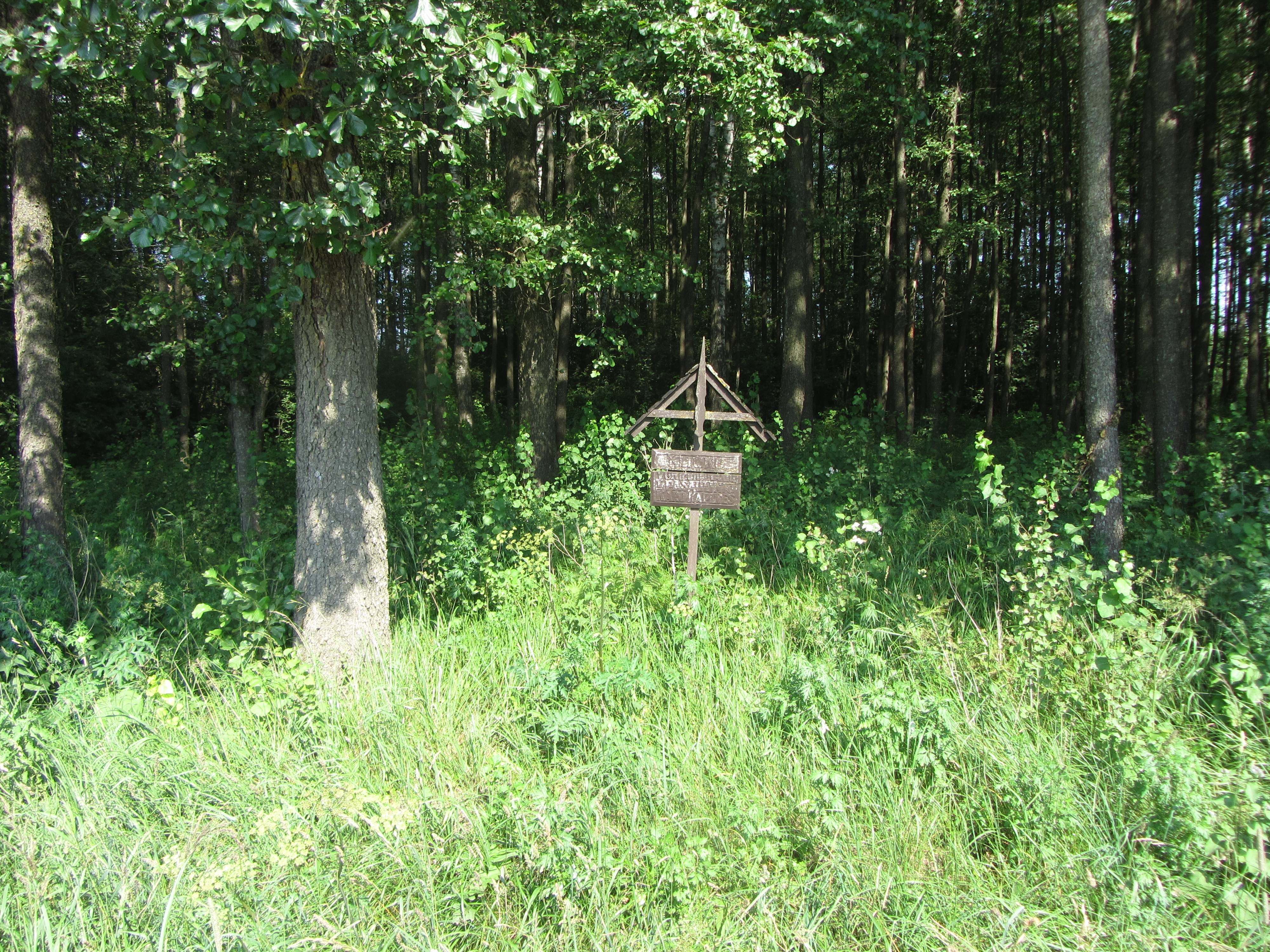 Didžiasalio sen., Lithuania